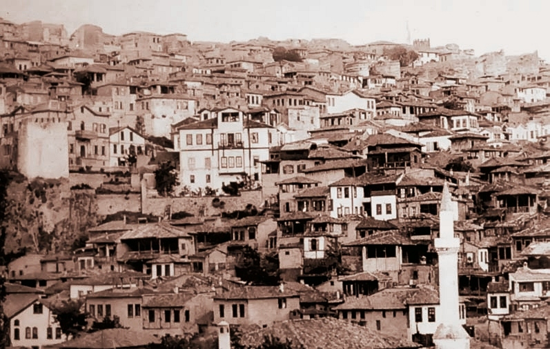 Ankara, 1917